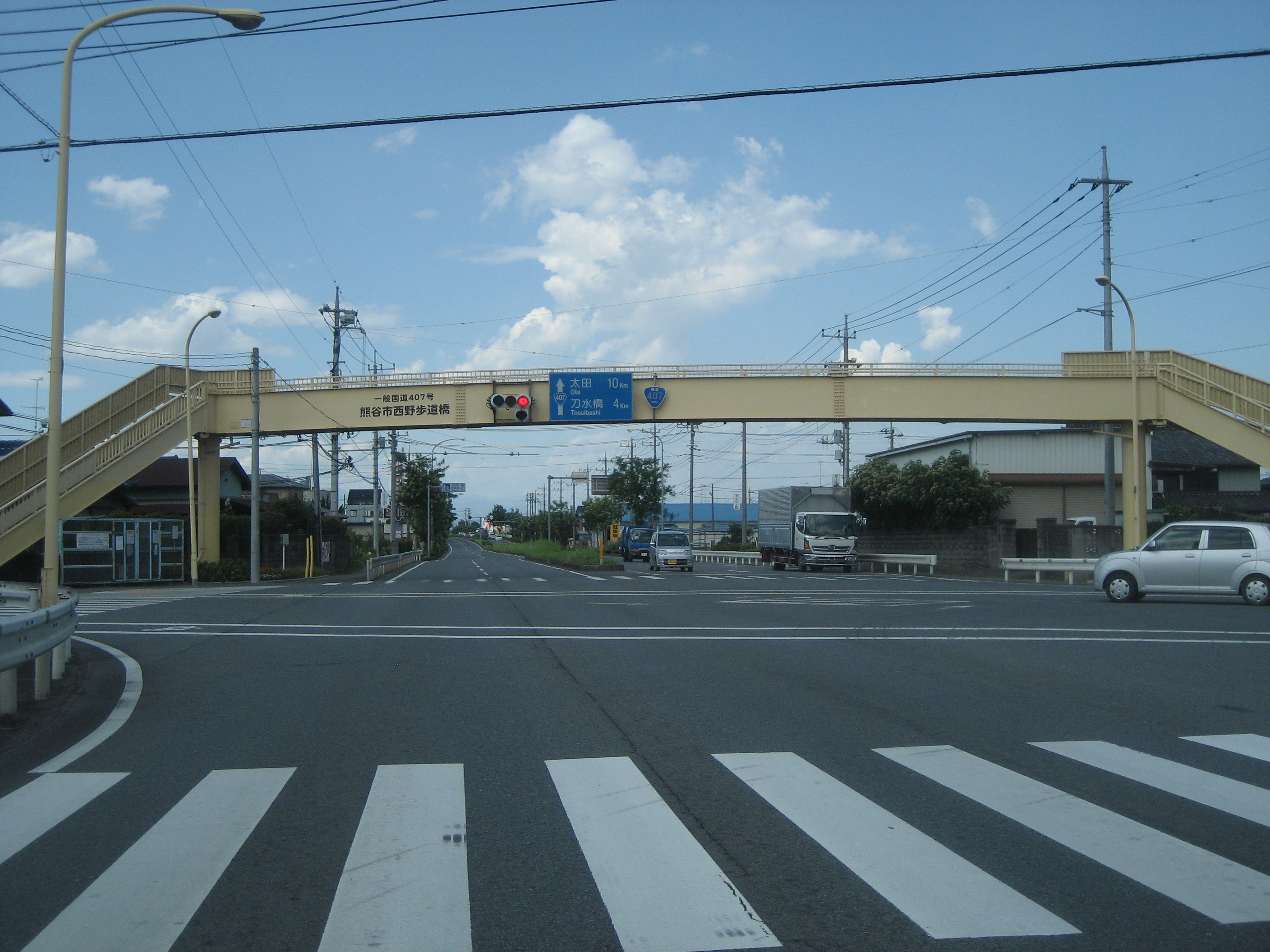 国道407号線埼玉県熊谷市西野付近（妻沼バイパス）